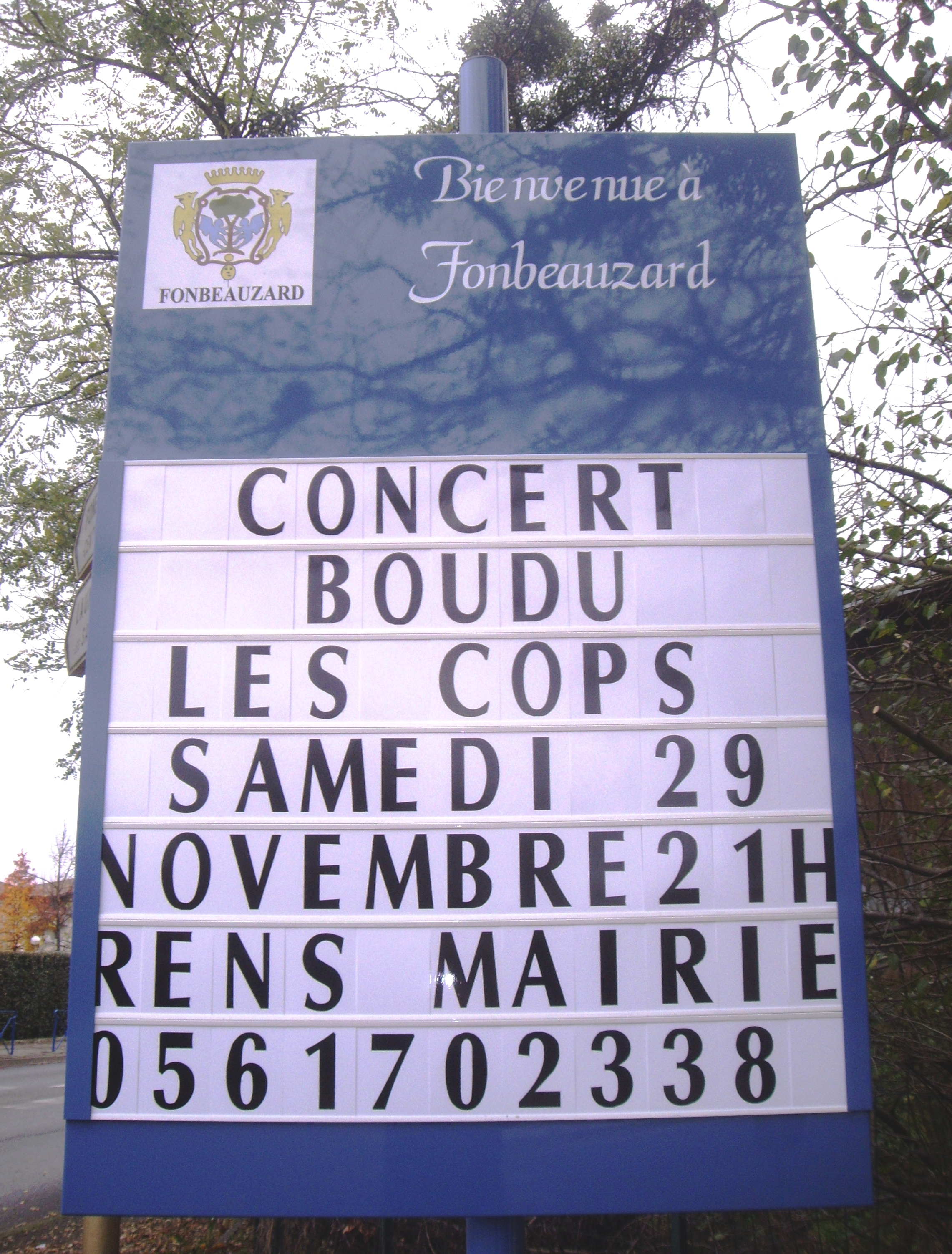 panneau